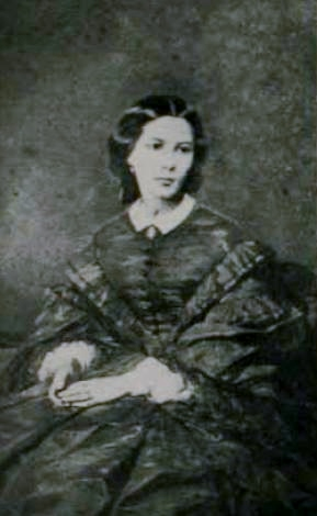 Amalia Urmeneta Quiroga de Errázuriz, esposa del empresario y politico chileno Maximiano Errázuriz y madre del pintor y diplomático José Tomás Errázuriz